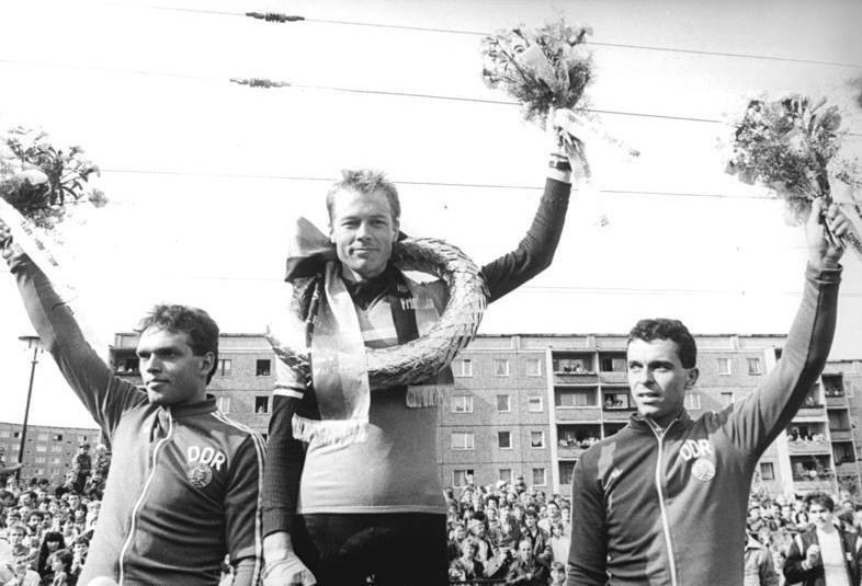 Olaf Ludwig, Morten Saether, Uwe Raab ADN-ZB Kapser-11.5.87-zip Gera: 40. Internationale Friedensfahrt-3. Etappe von Magdeburg nach Gera über 186 km. Siegerehrung im Neubaugebiet Gera-Lusan. Bildmitte der 27-jähirge Norweger Morten Saether (1. Platz). Links Olaf Ludwig -2. Platz) und rechts Uwe Raab (3.Platz-beide DDR), der das Gelbe Trikot erfolgreich verteidigte.